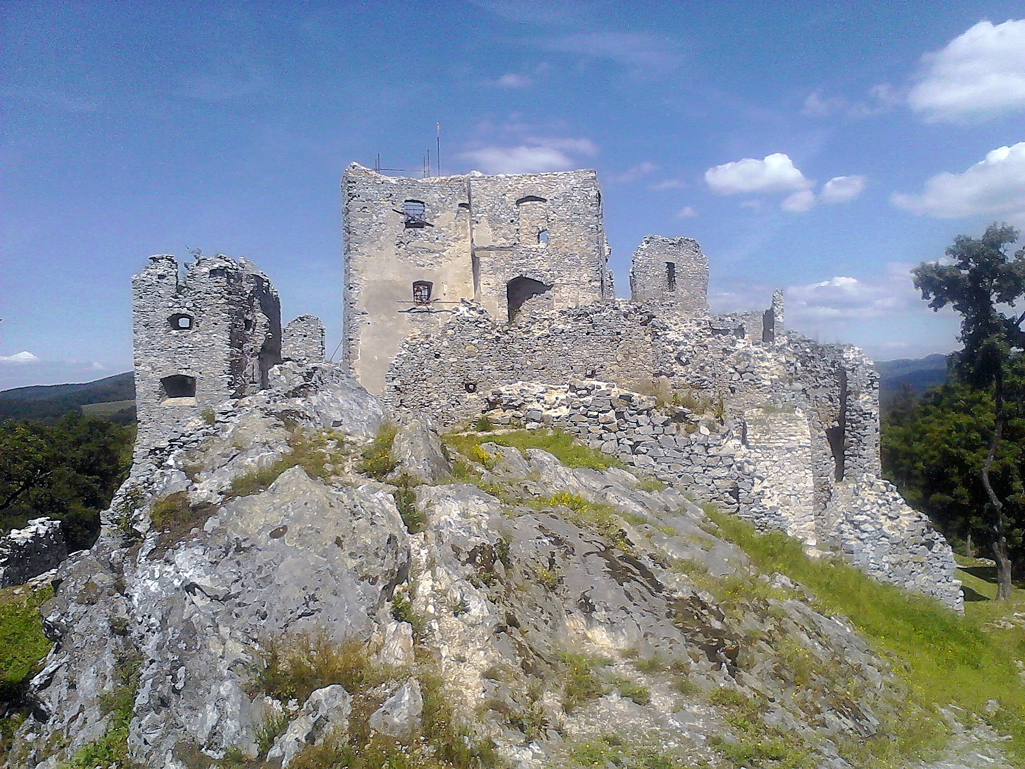 Palác hradný juhozápadný ii.